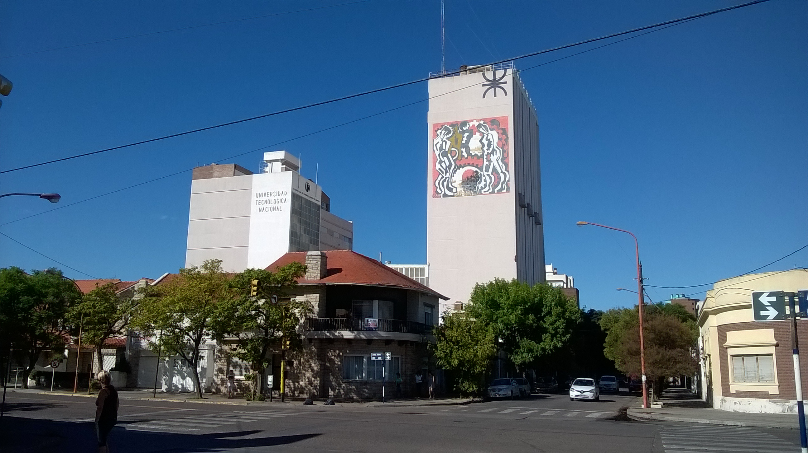 Universidad Tecnologica Ncional, Facultad Regional Bahía Blanca